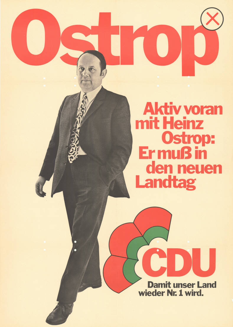 Ostrop Aktiv voran mit Heinz Ostorp: Er muß in den neuen Landtag CDU Damit unser Land wieder Nr.1 wird. Abbildung: Foto - Stimmkreuz Kommentar: Auf der Rückseite teilweise mit Kugelschreiber beschriftet. Plakatart: Kandidaten-/Personenplakat mit Porträt Objekt-Signatur: 10-009 : 653 Bestand: Landtagswahlplakate Nordrhein-Westfalen (10-009) GliederungBestand10-18: Landtagswahlplakate Nordrhein-Westfalen (10-009) » CDU Lizenz: KAS/ACDP 10-009 : 653 CC-BY-SA 3.0 DE